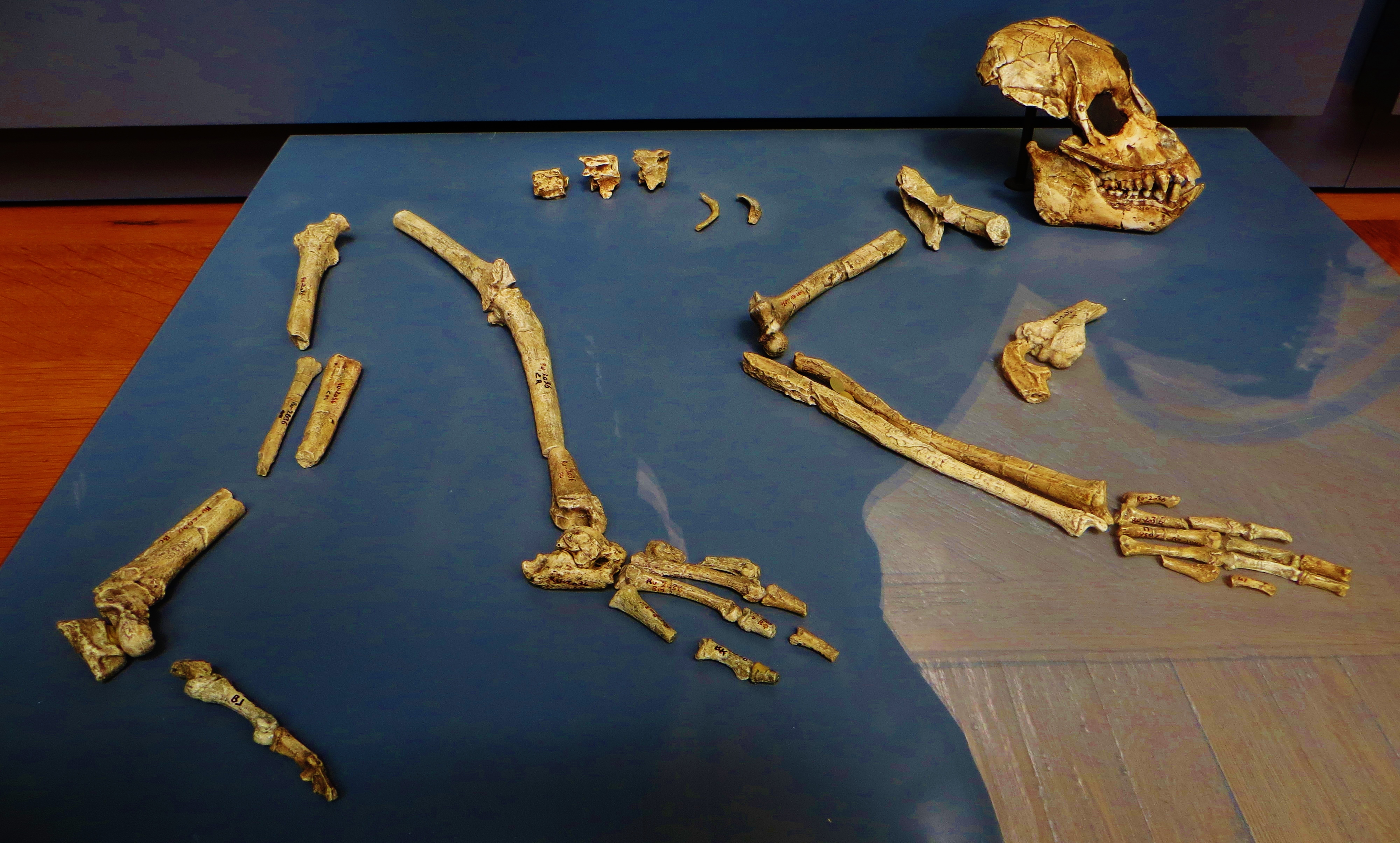 Fossil of Ekembo, an extinct mammal - Took the photo at Musee d'Histoire Naturelle, Paris